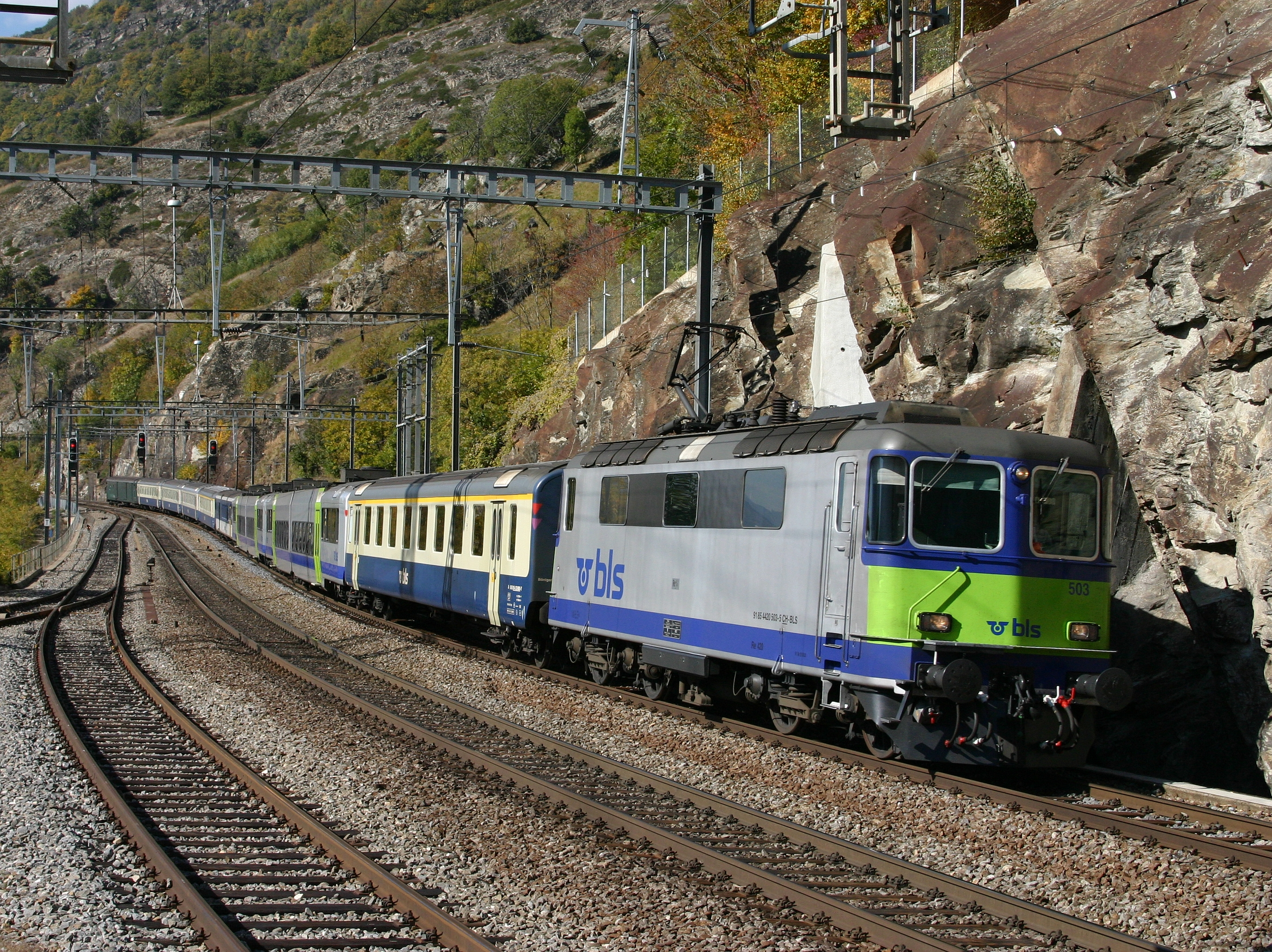 La Re 420 503 du BLS en gare de Lalden